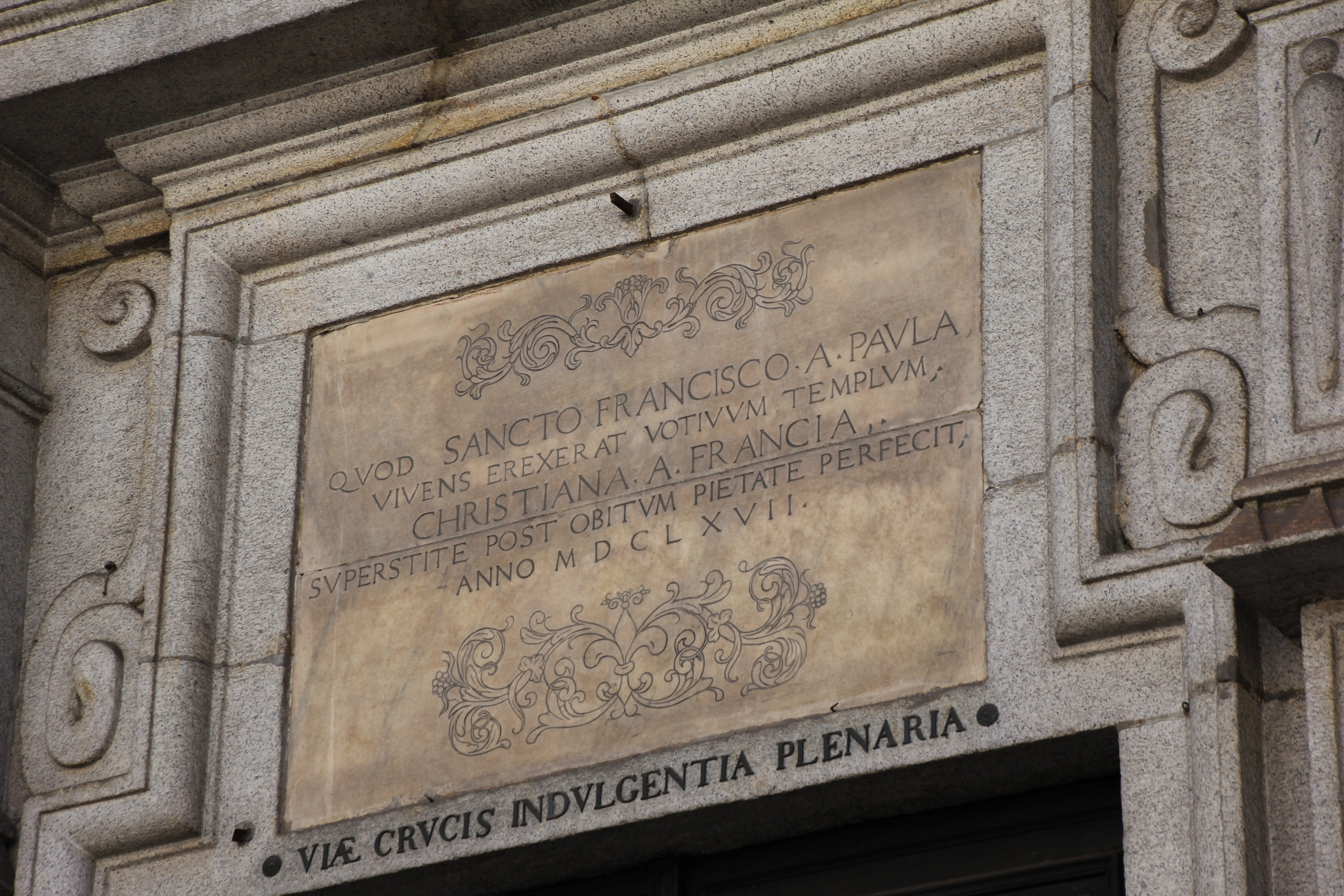 Torino, chiesa di San Francesco da Paola